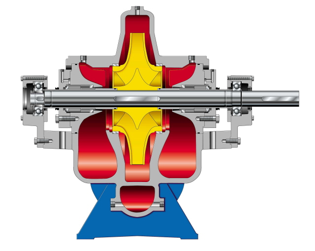 Typische Wasserwerkspumpe (älterer Bauart) im Schnittbild. Bauform Spiralgehäuse (Schneckengehäuse).